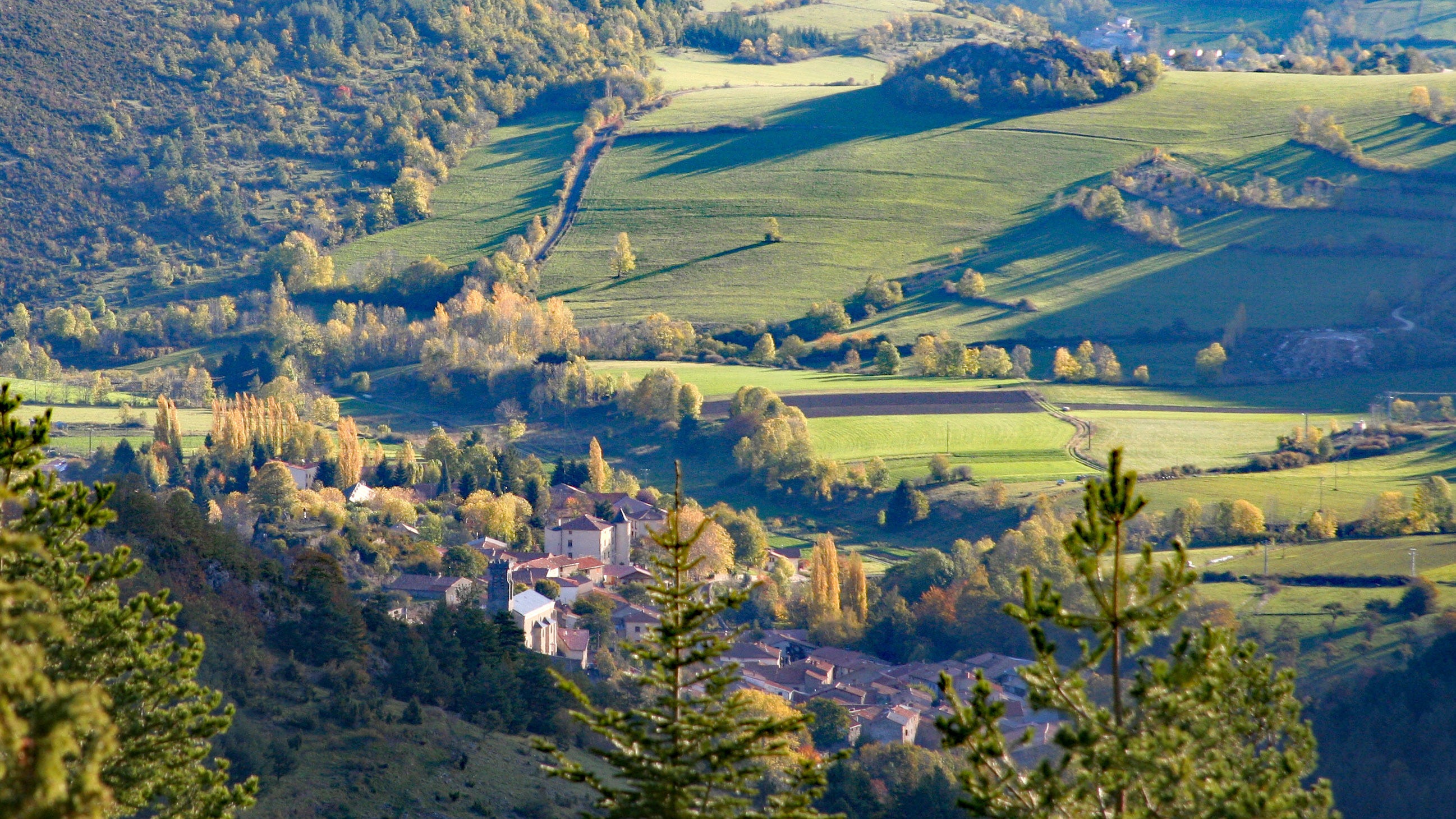 Vue de l'ouest